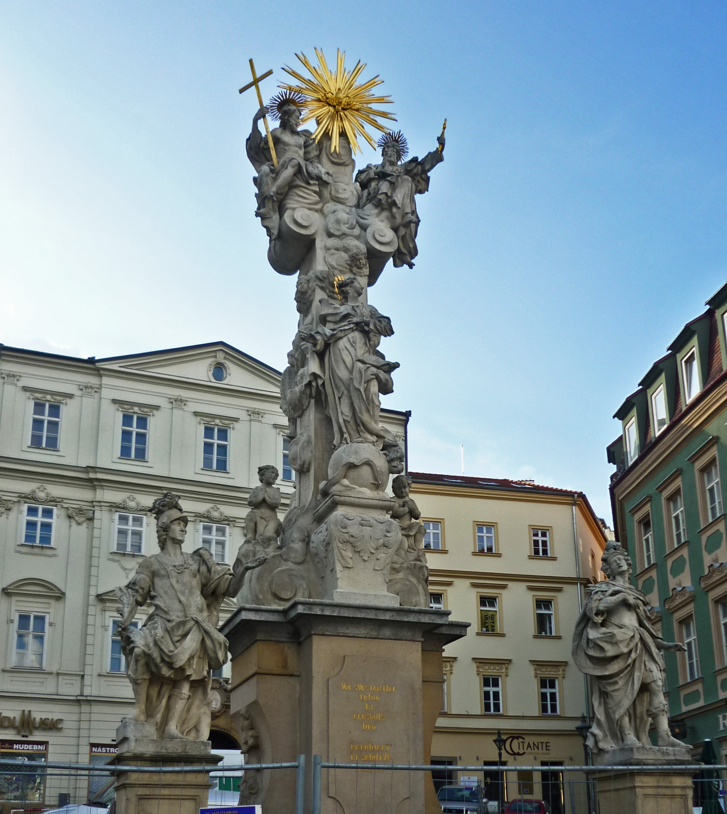 Dreifaltigkeitssäule am Kohlmarkt in Brünn (Brno)